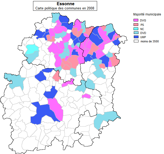 Carte politique communes municipales 2008 Essonne